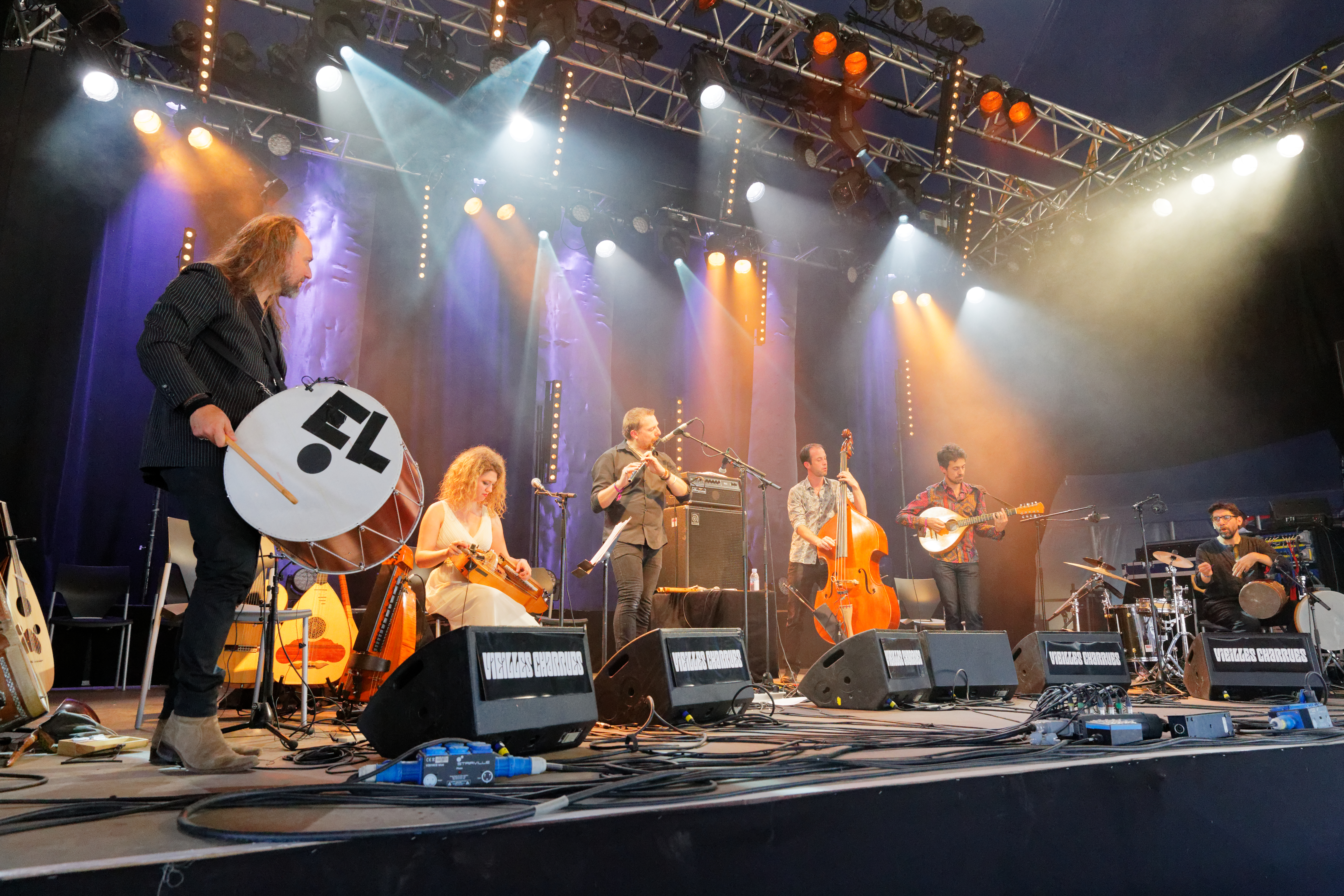 Sylvain Barou en concert lors du festival des vieilles charrues 2017.